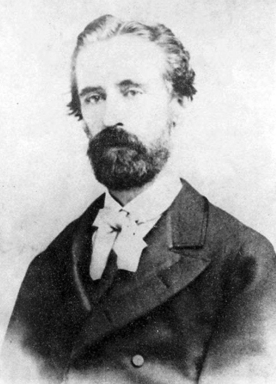 Maximiano Errázuriz Valdivieso, (Santiago, el 21 de febrero de 1832. Dejó de existir en su fundo Panquehue, San Felipe, el 17 de noviembre de 1890). Agrimensor y político conservador chileno.